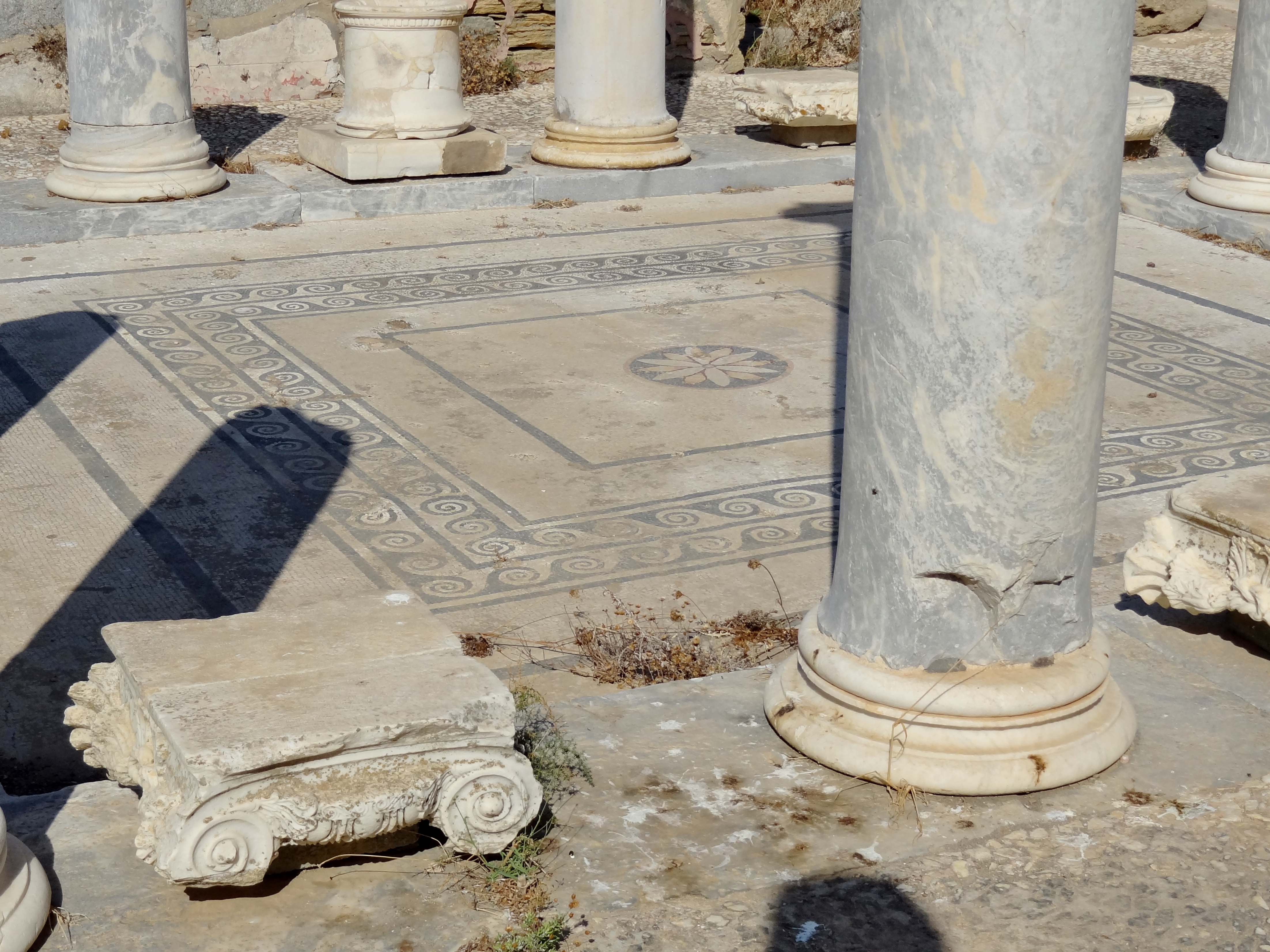 Seehaus am Heiligen See der Ausgrabungsstätte von Delos, Kykladen, Griechenland